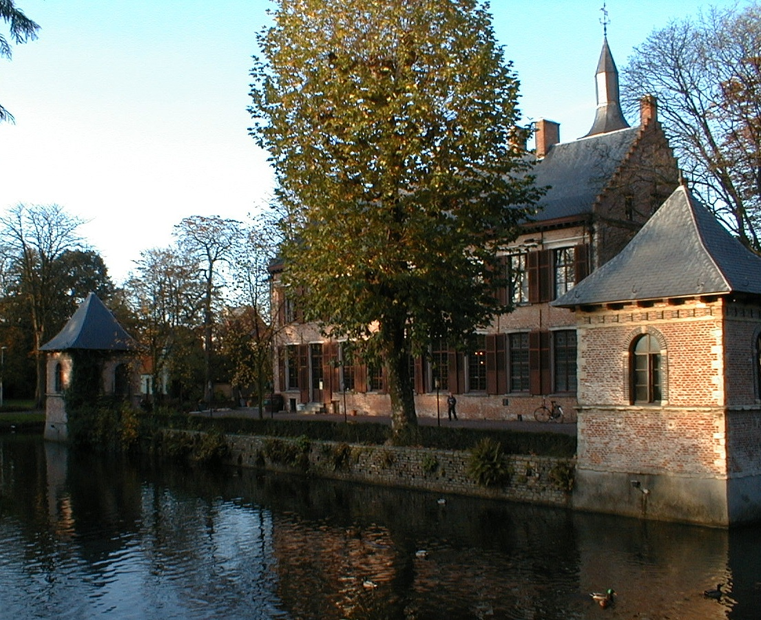 Walburg